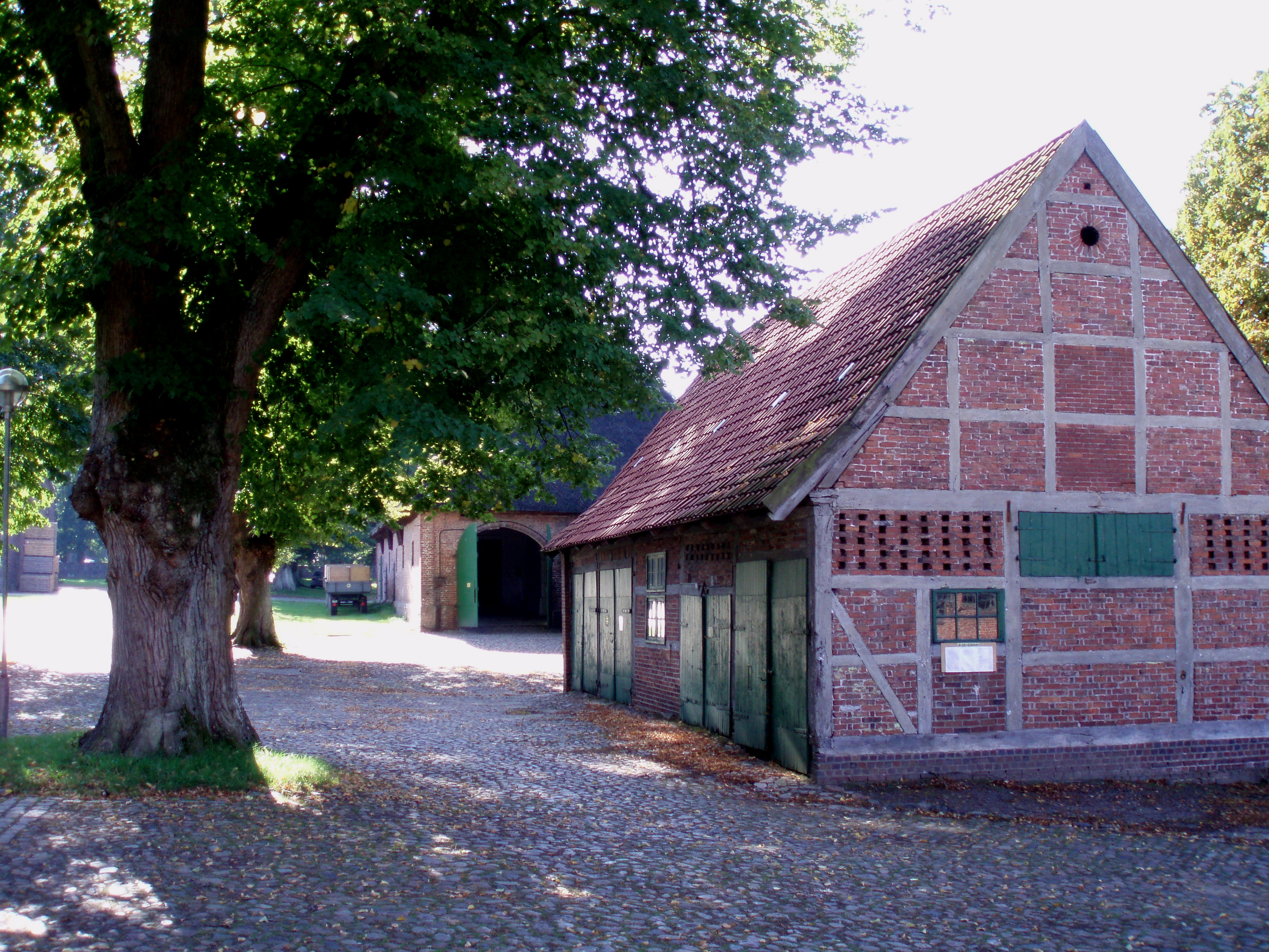 Barns at Schloss Agathenburg.